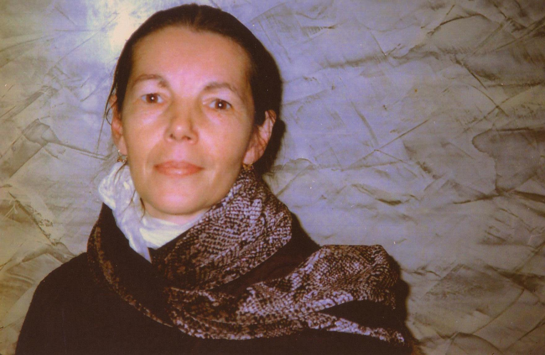 Kornelija Gere, hrvatska slikarica